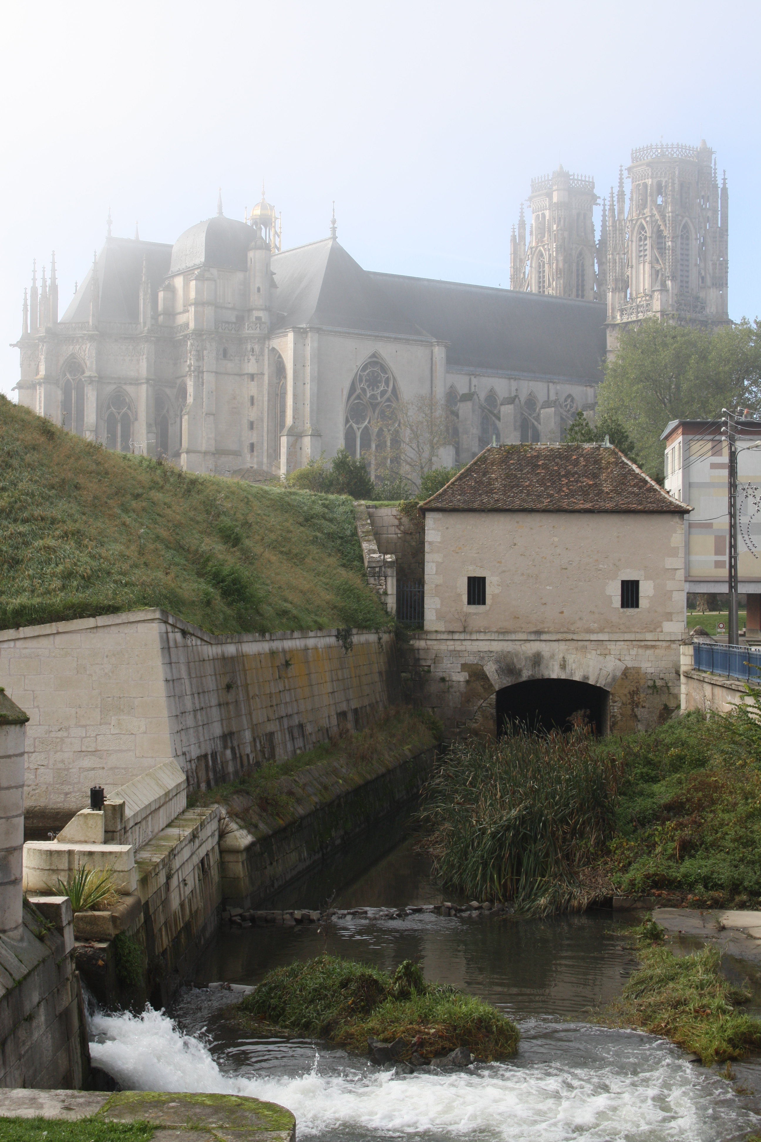 Fortifications et Cathédrale de Toul